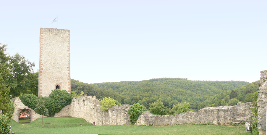 Burg Greene, Hauptburg mit Bergfried